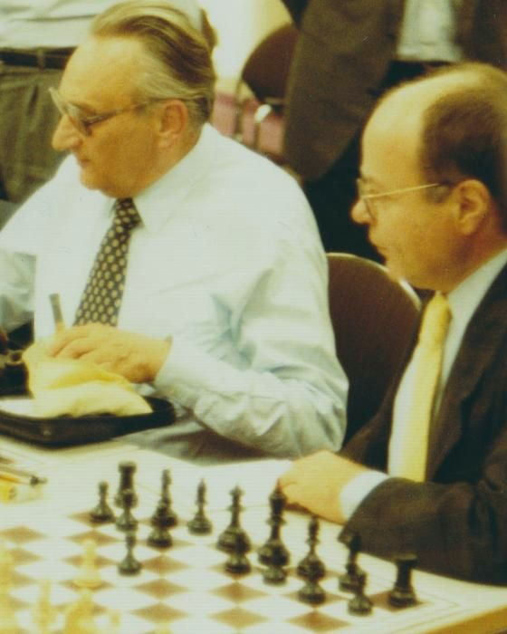 Egon Bahr und Johannes Gross 1985 in Hamburg bei einem Simultanspiel des späteren Schachweltmeisters Garry Kasparov, eine Veranstaltung des Nachrichtenmagazins Der Spiegel.